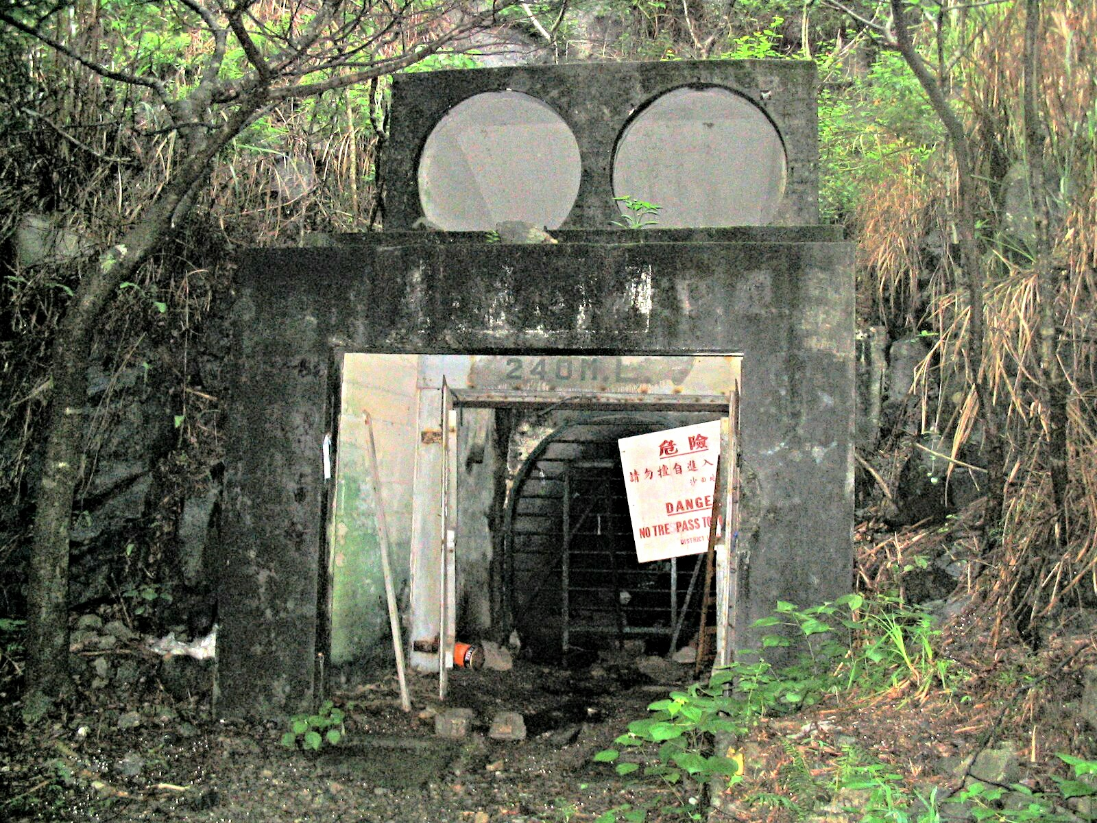 5-2005香港馬鞍山石礦場240M入口